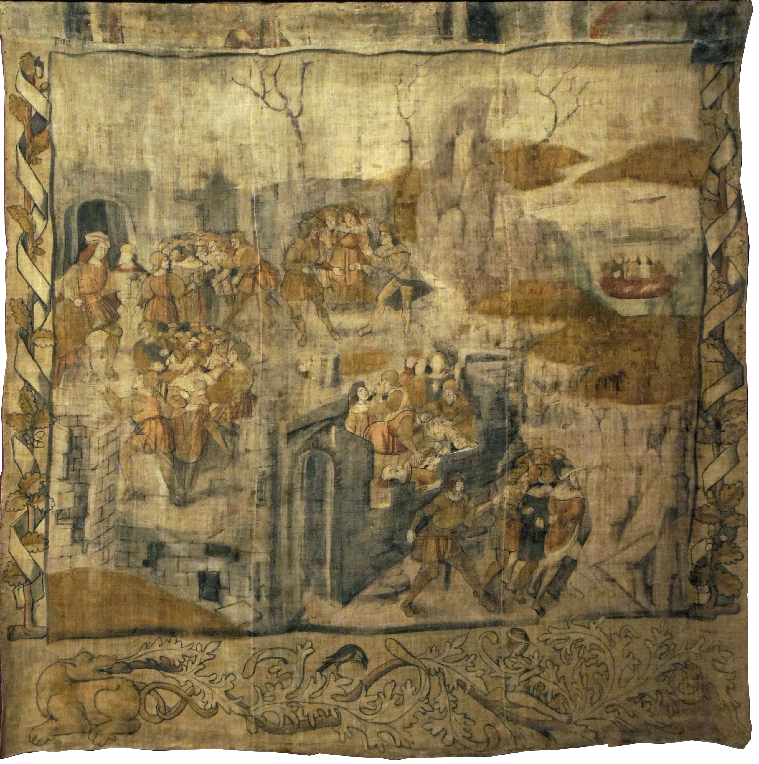 Hospices_de_Reims_les_juifs_enchainés_et_vendus. Peinture sur toile par un anonyme rémois.